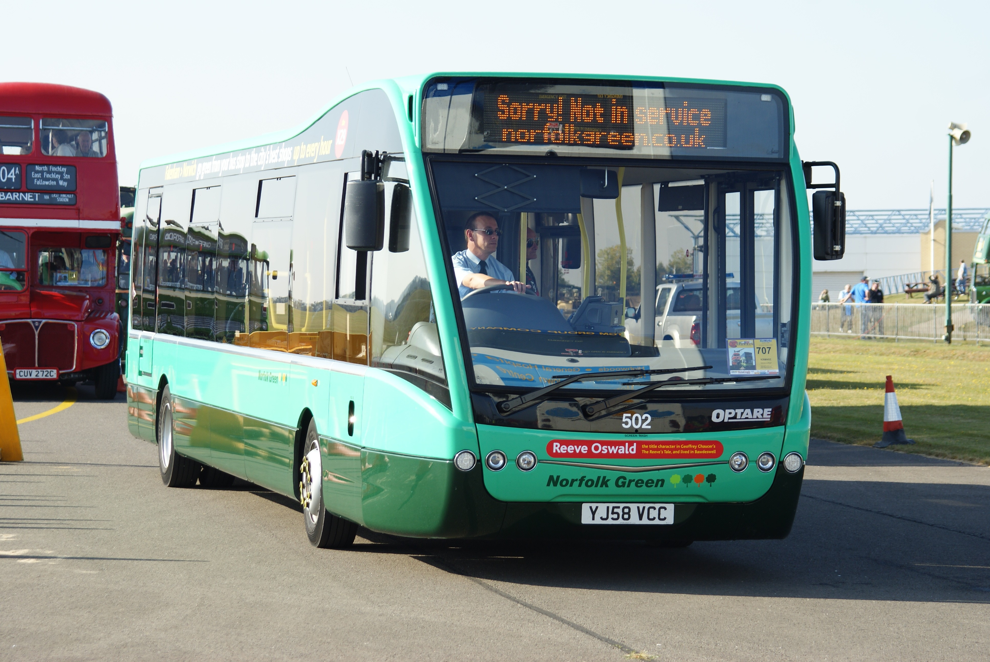 YJ58VCC 270909 CPS